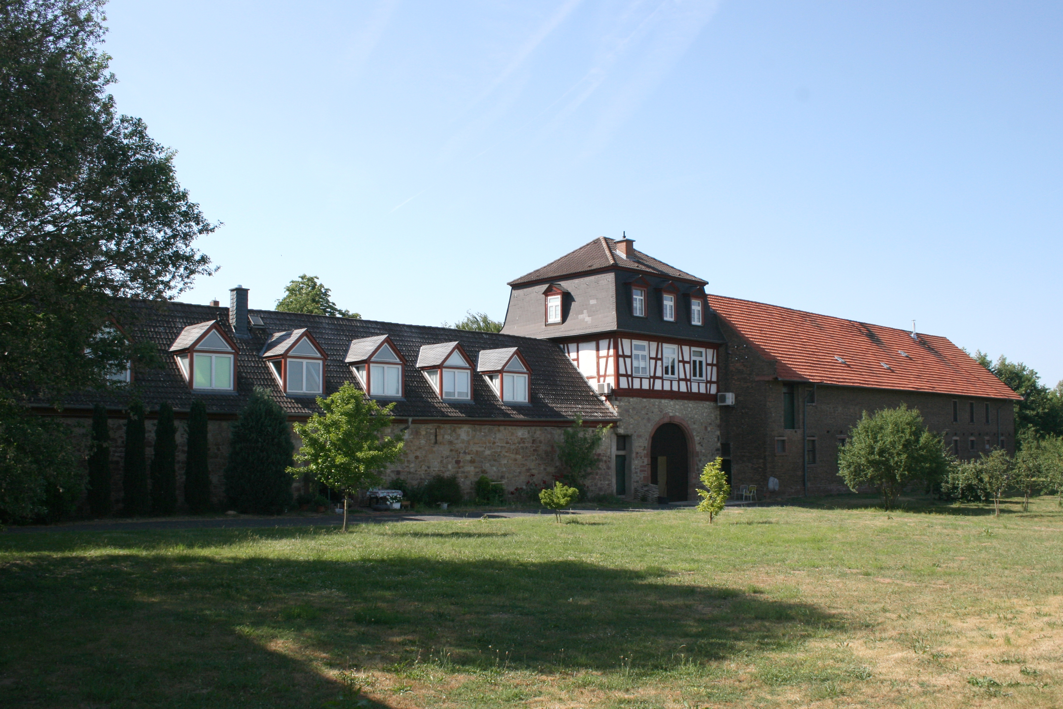 Junkerhof in Niederdorfelden, Main-Kinzig-Kreis, Hessen (Rückseite).